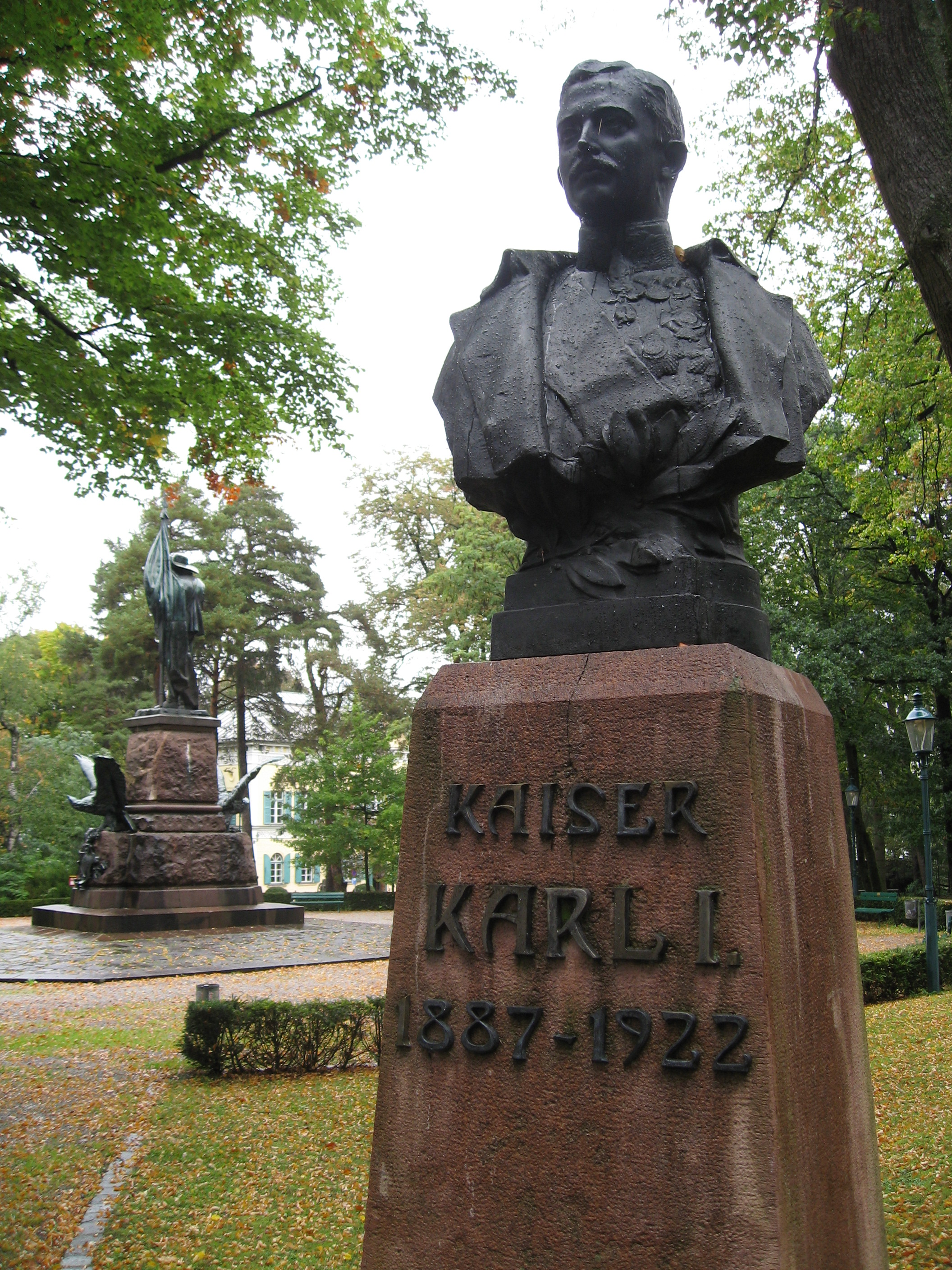 Österreich, Innsbruck, Bergisel, Andreas-Hofer-Denkmal im Hintergrund